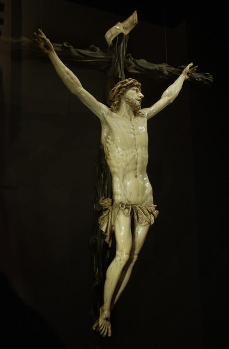 Cristo de marfil de la catedral de Pamplona